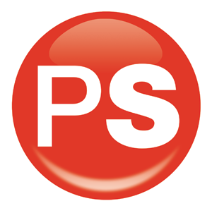 Le logo officiel du Parti socialiste (Belgique).